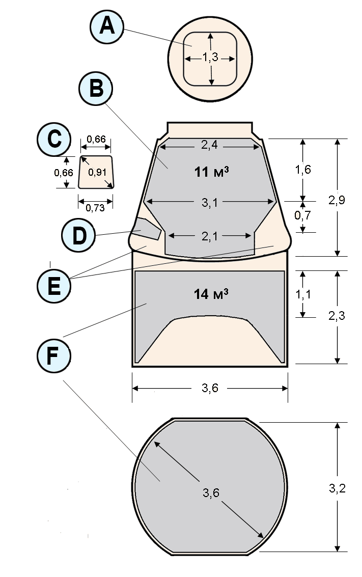 Dimensions et volumes du cargo spatial SpaceX Dragon